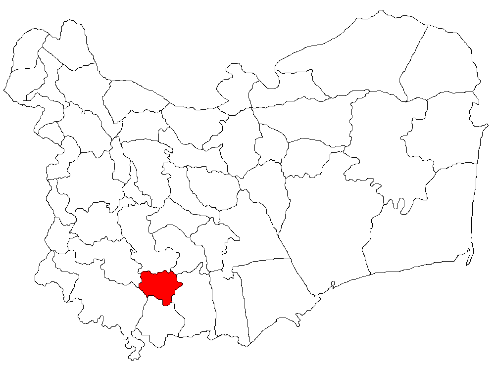 Categorie:Hărţi ale judeţului Tulcea